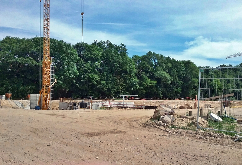 Arona Klinik für Altersmedizin im Bau in Berlin-Biesdorf